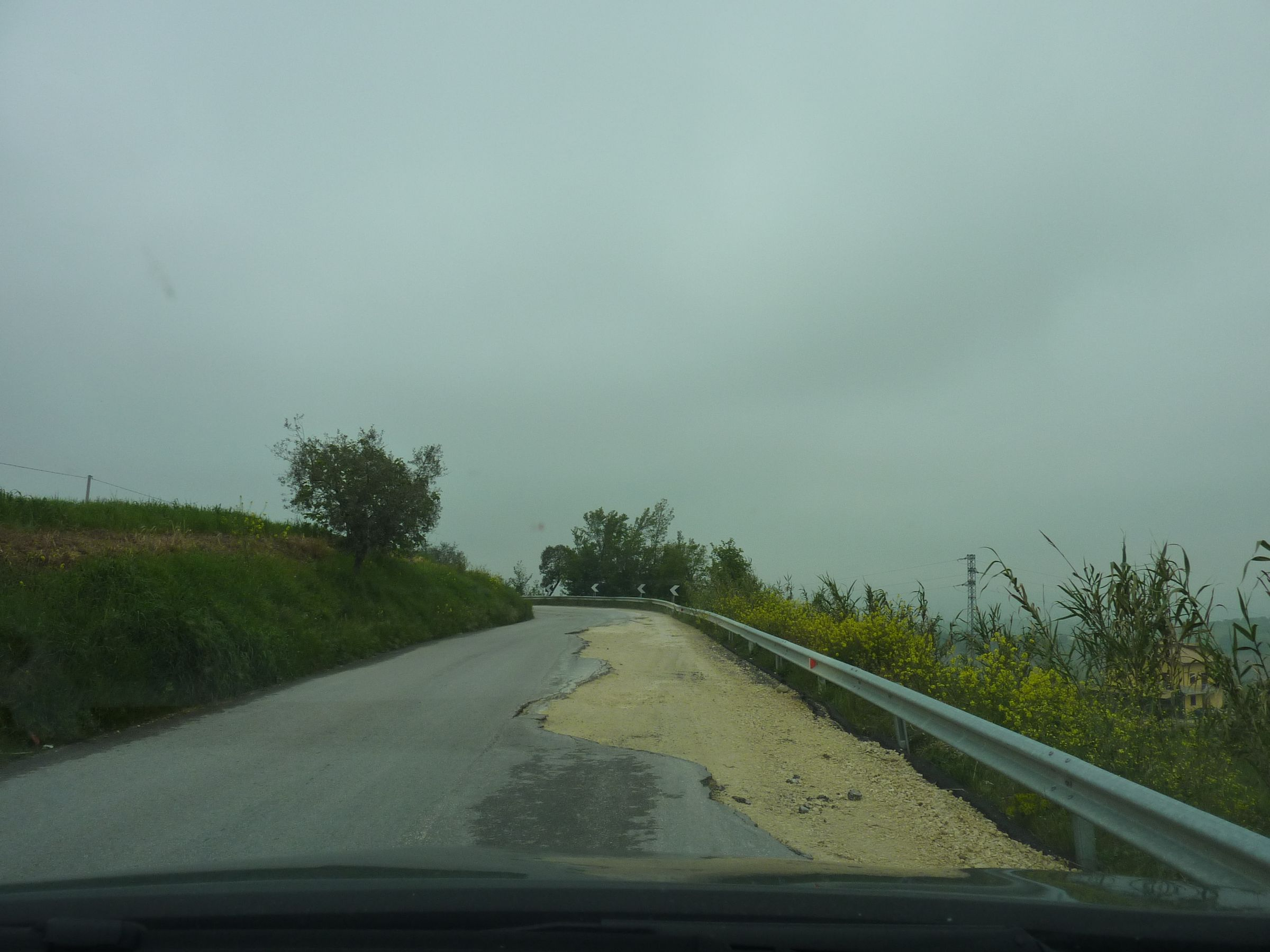 Straßenschäden